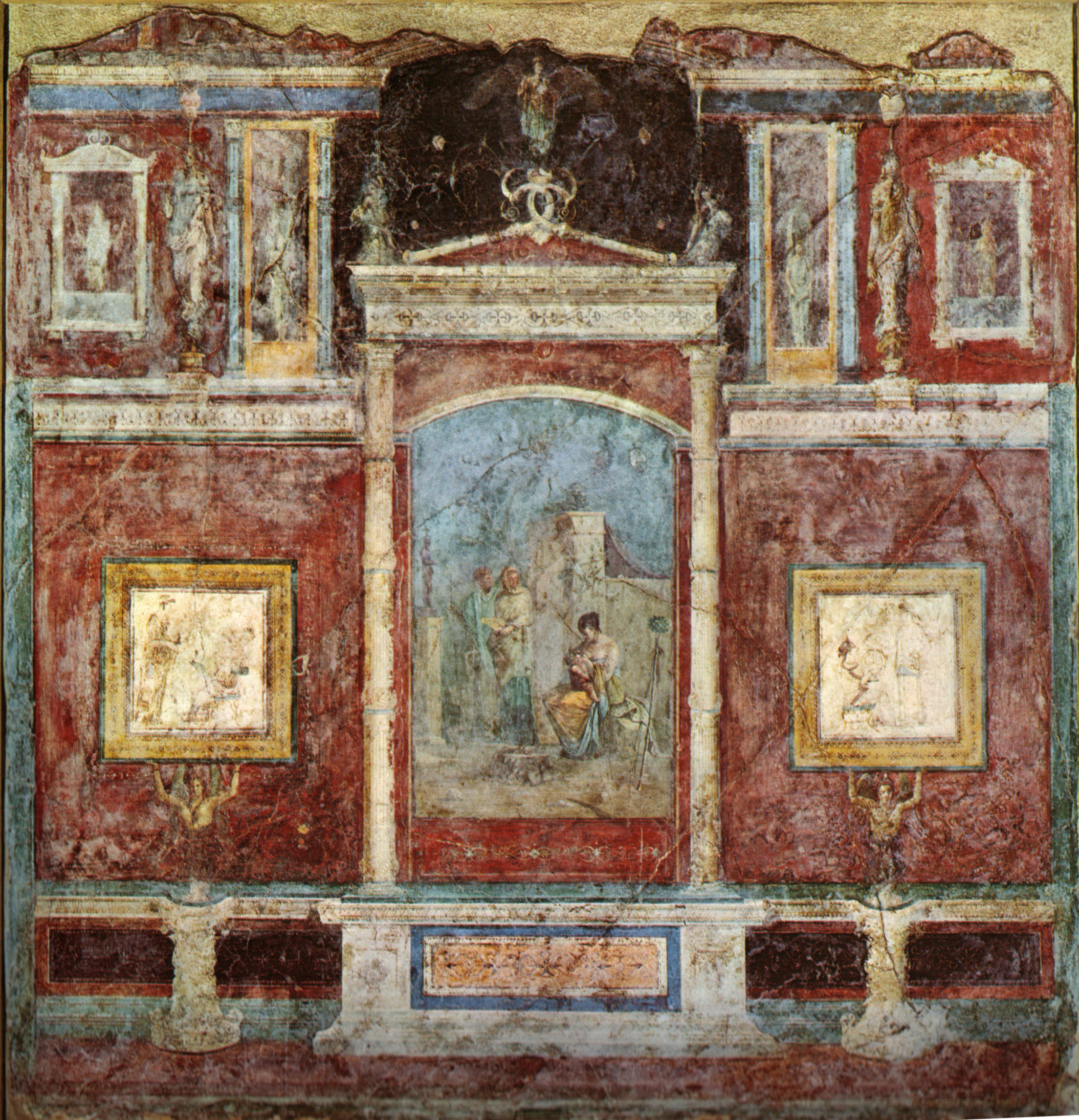 Casa della farnesina, parete del cubicolo B, 30-20 a.C.